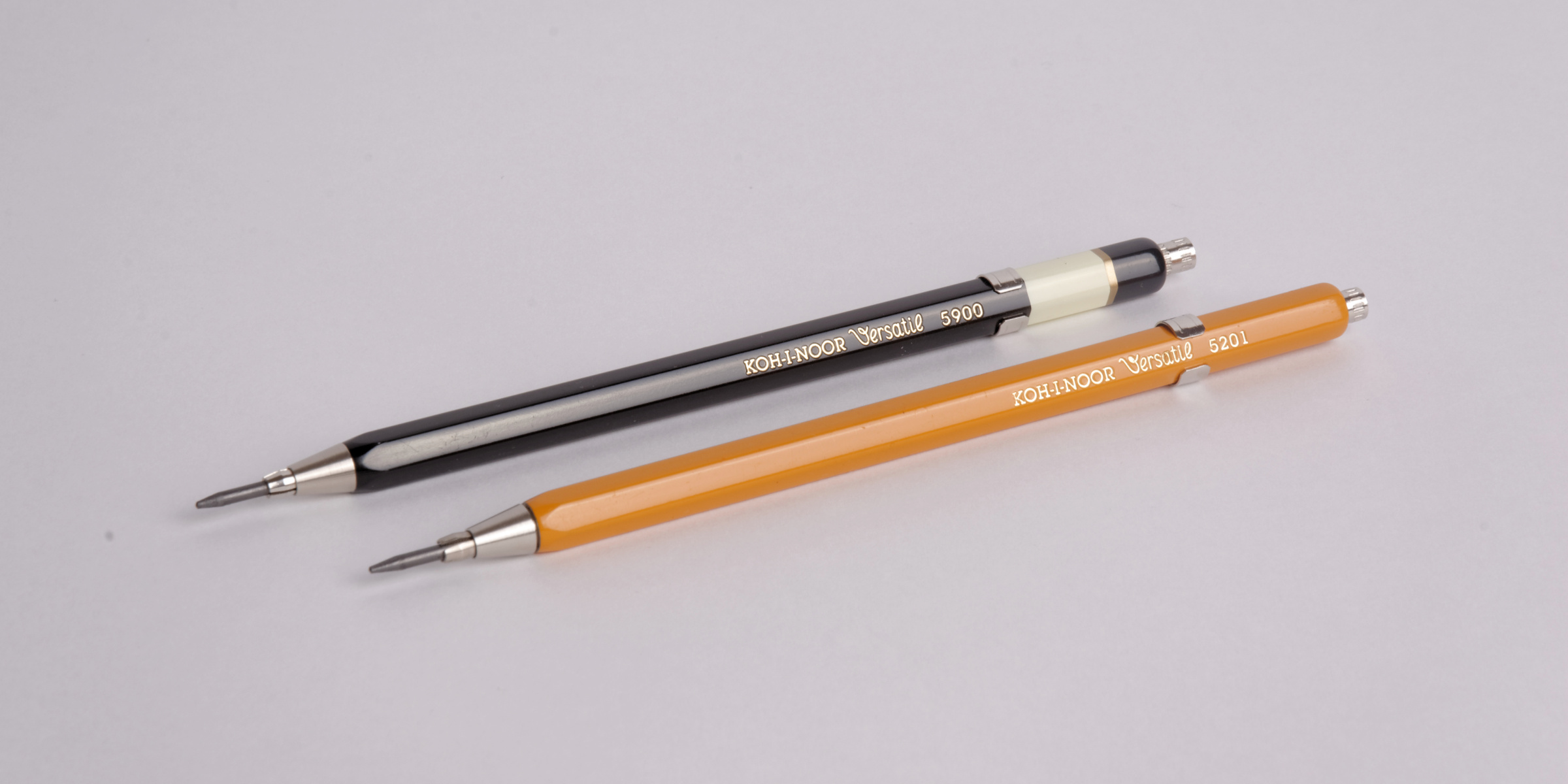 Tužky Koh-I-Noor Versatil, modely 5201 a 5900.